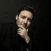 Foto Daniel Ligorio para Wikipedia